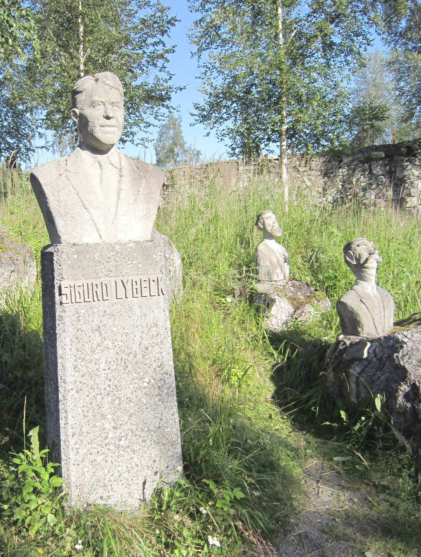 Byste av Sigurd Lybeck sammen med figurer fra fortellingene hans, som Bustenskjold og Plassbakk-kallen, ved Etnas høyre bredd nedenfor Lundebrue